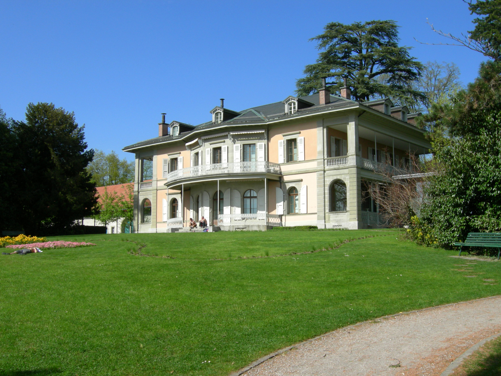 Lausanne, Hermitage, façade sud